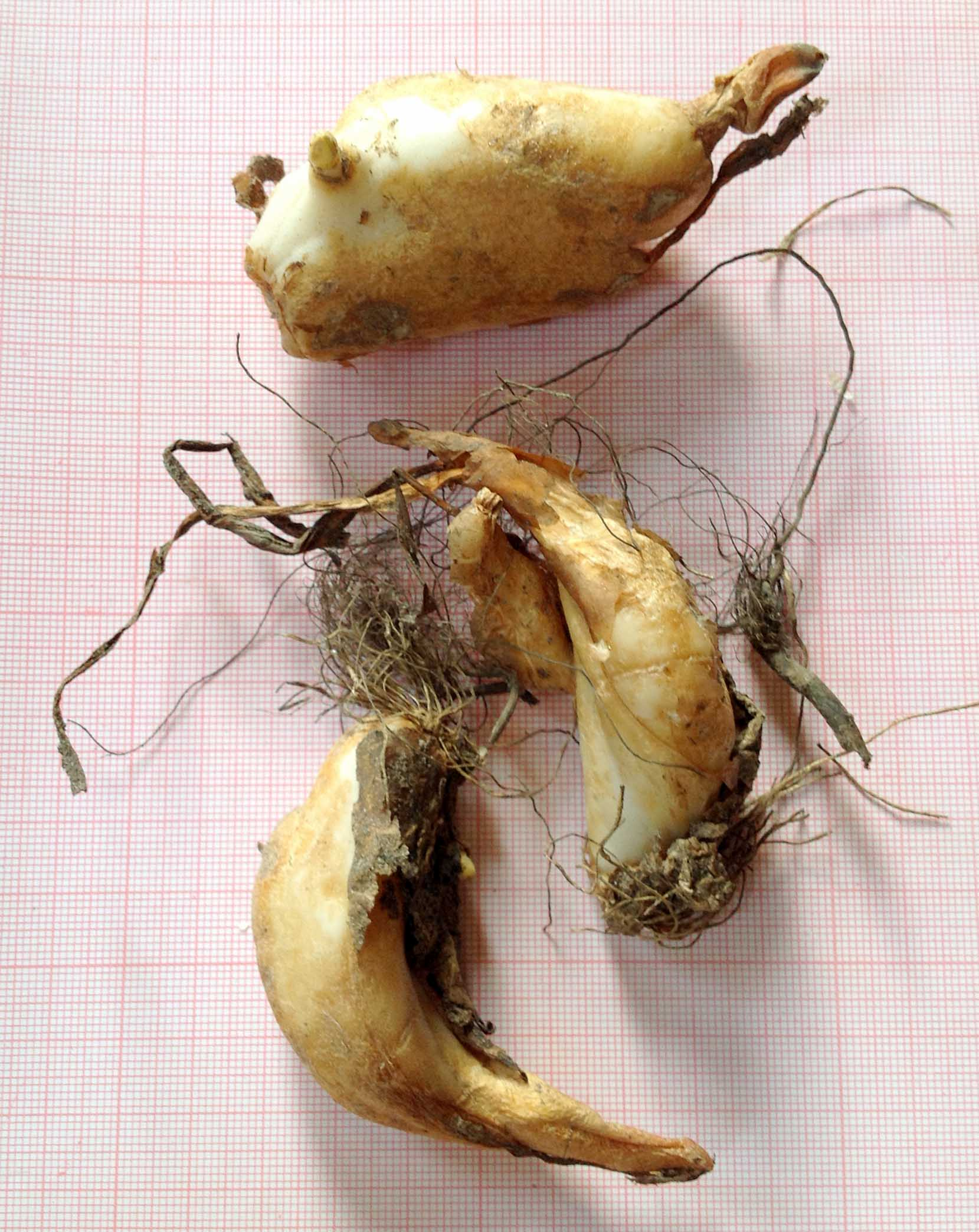 Zwiebeln von Eryhronium 'Pagoda'